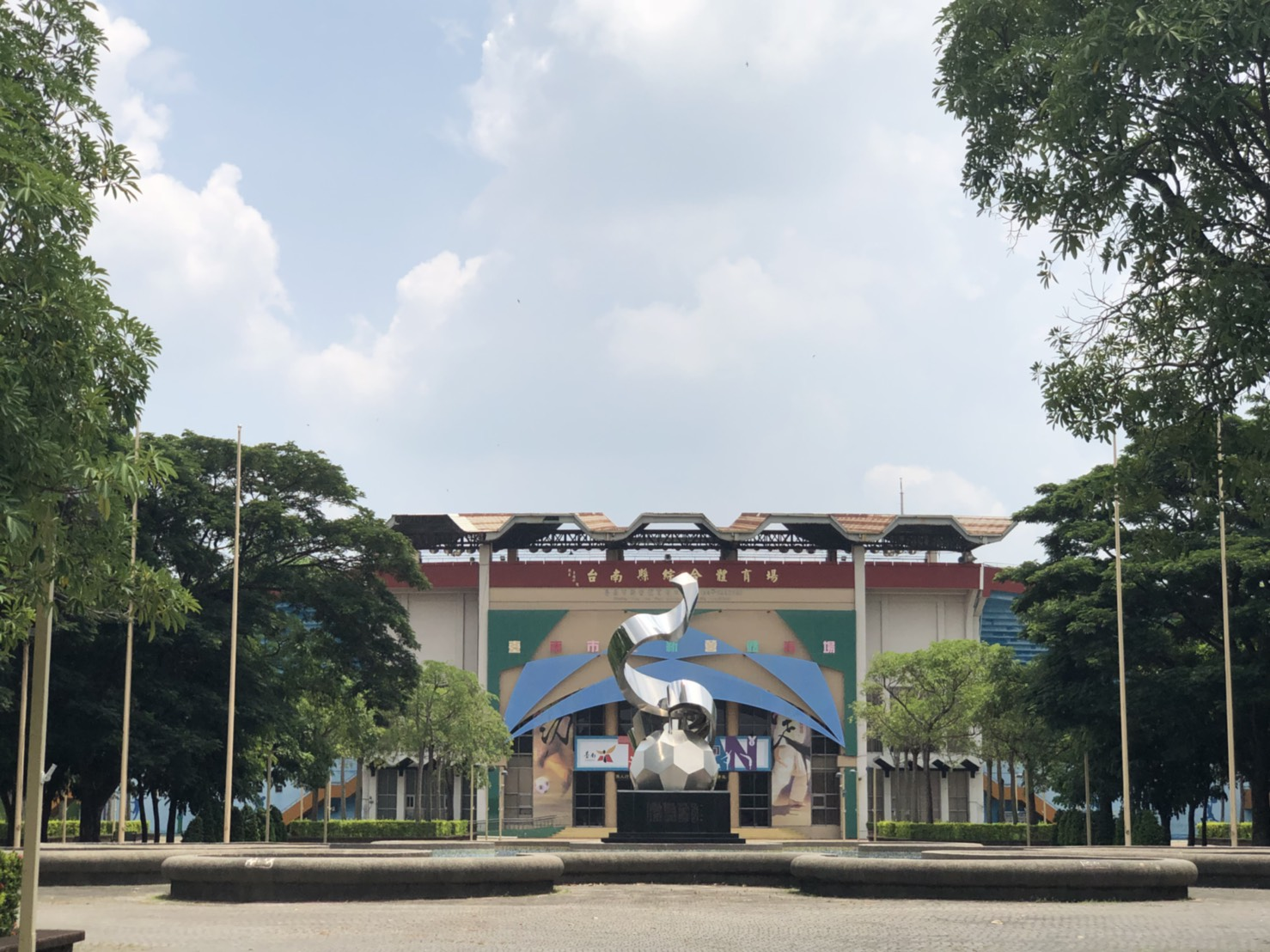 中文（台灣）: 新營體育場田徑場門口